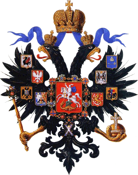 Малый герб при Александре II. C 8 декабря 1856 по 22 февраля 1883 г.